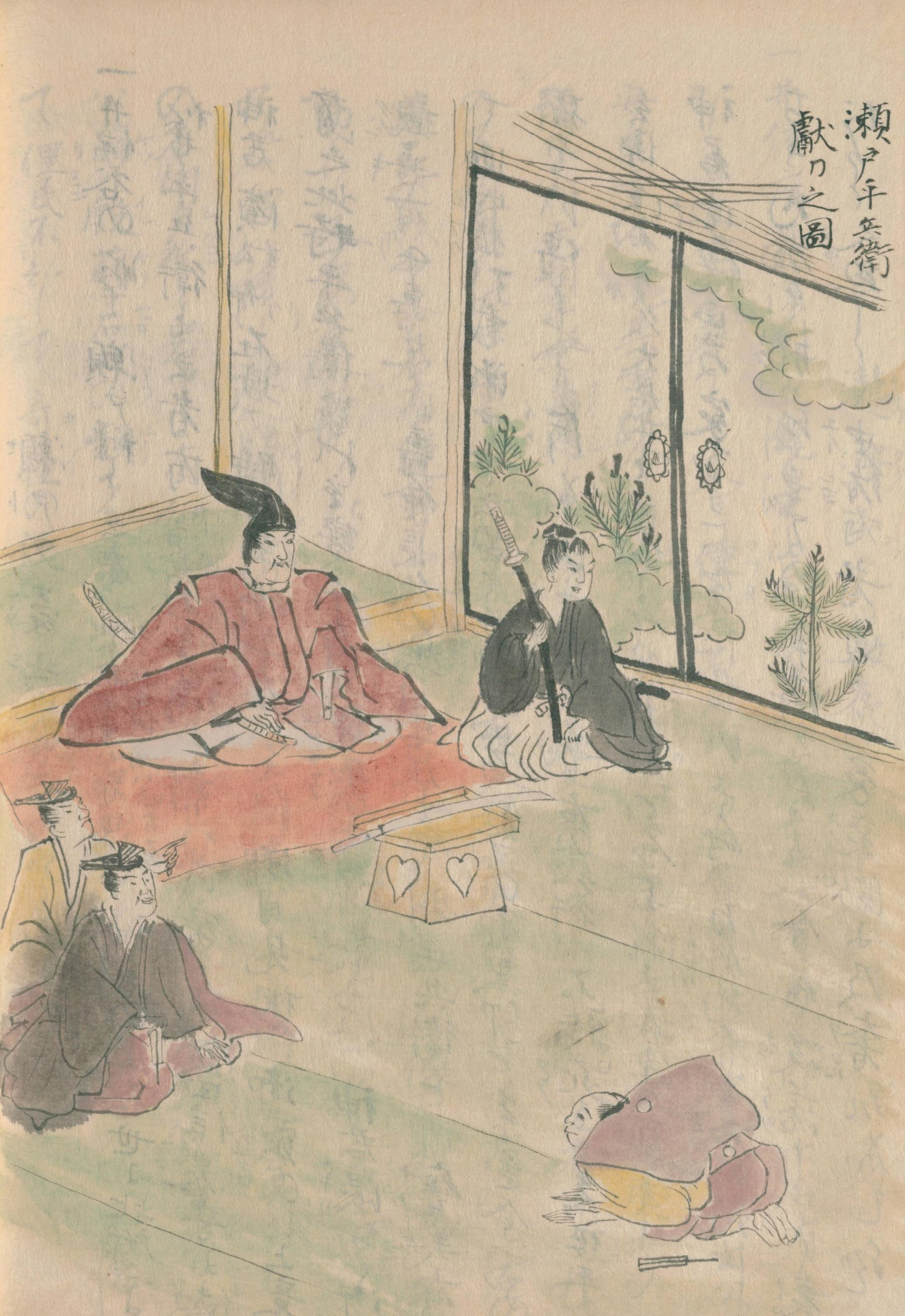 瀬戸方久の肖像。